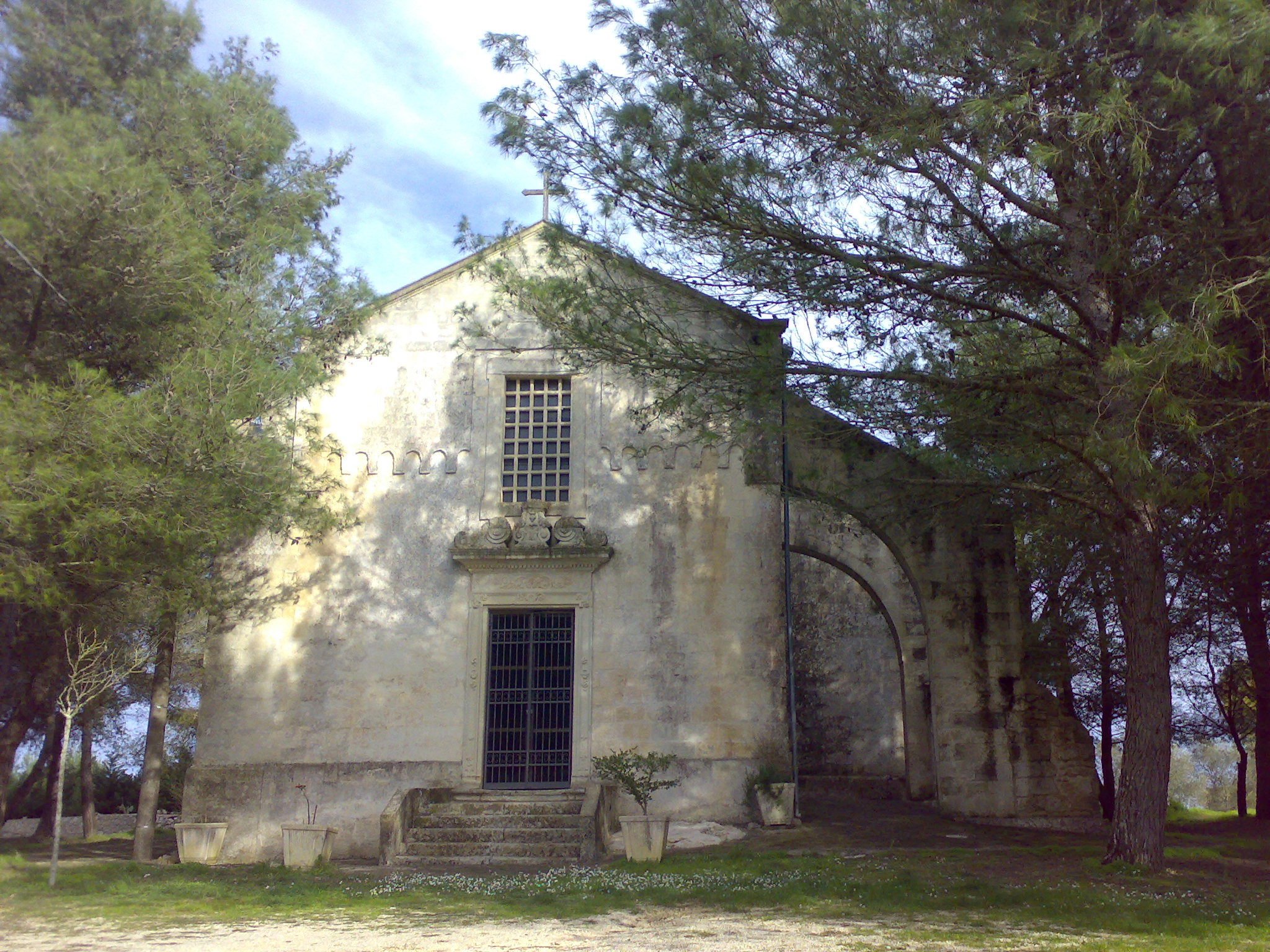 Minervino_di_Lecce_Santa Croce, provincia di Lecce